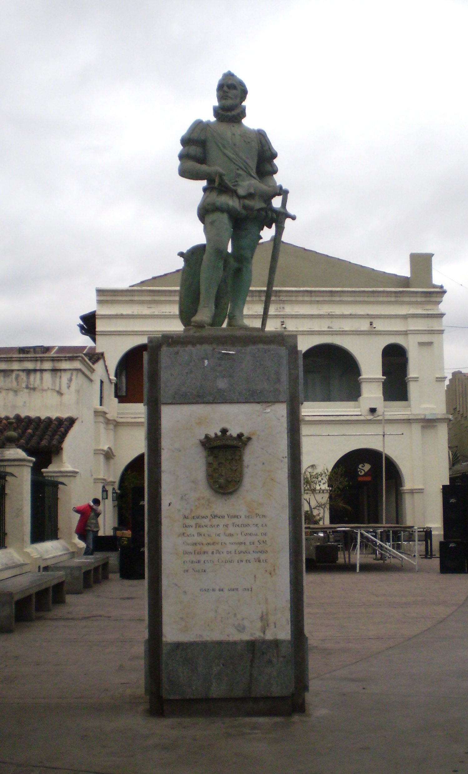 Monumento al virrey Francisco Álvarez de Toledo en la ciudad de Salta, Argentina